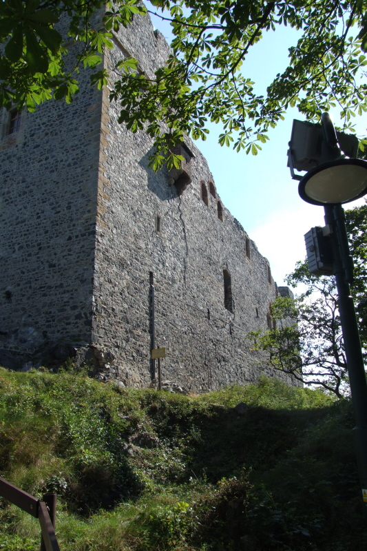 Burg Radyne